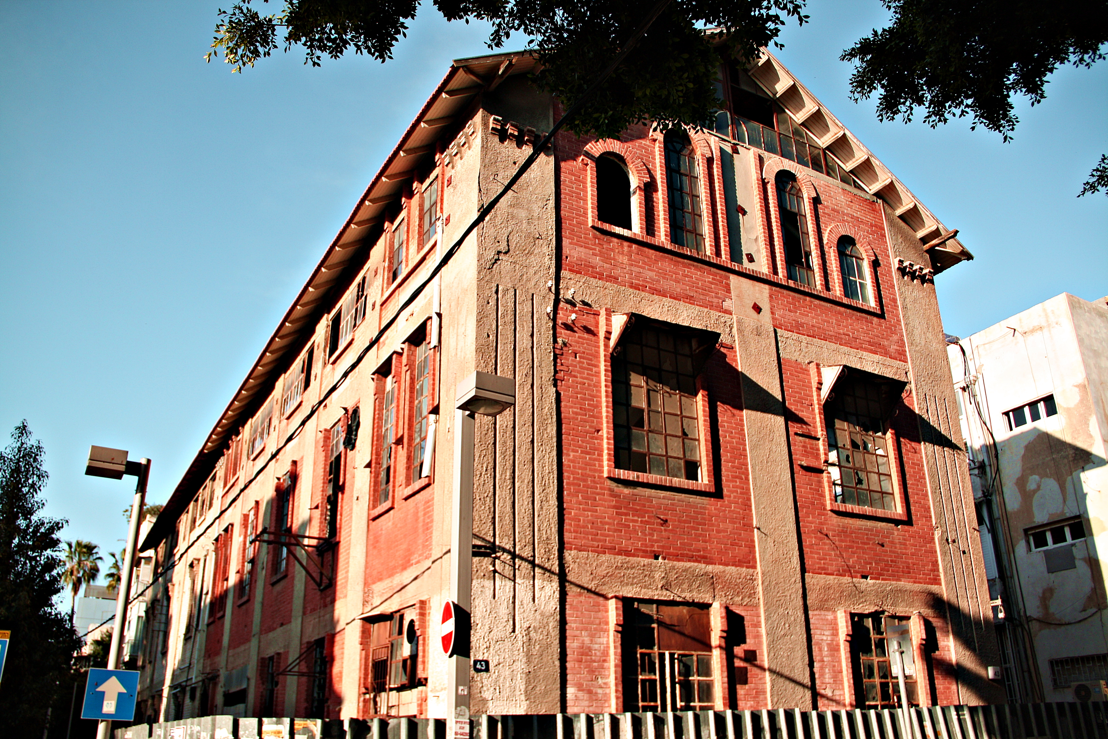 he:בית לודז'יה רחוב נחמני תל אביב